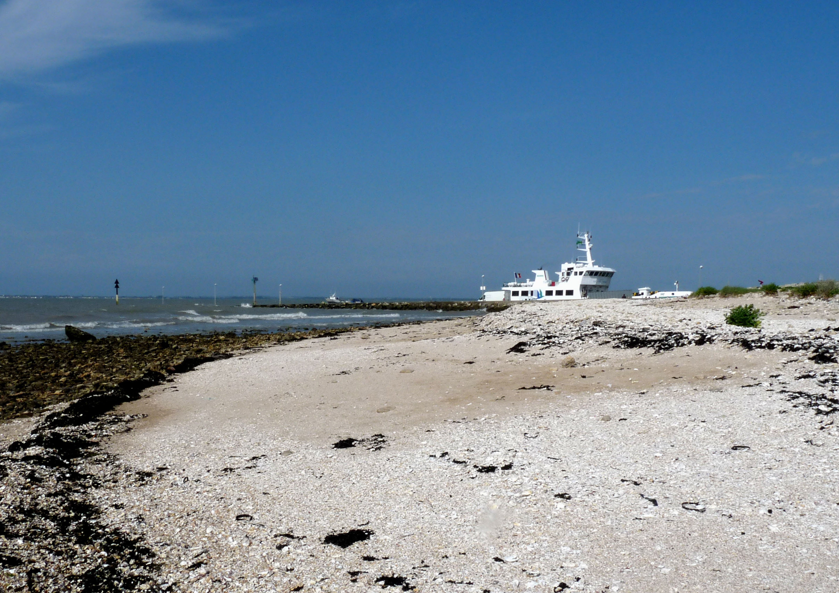 Pointe de la Fumée (Charente-Maritime)